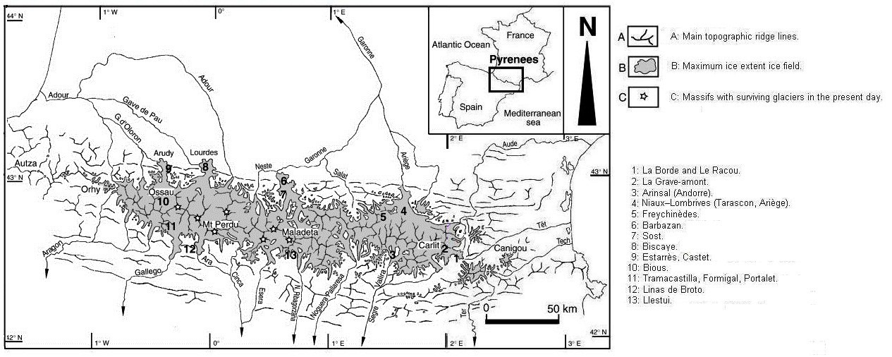 Carte de l'extension maximale des glaciers pyrénéens à la dernière glaciation (entre 29500 et 24400 avt JC)